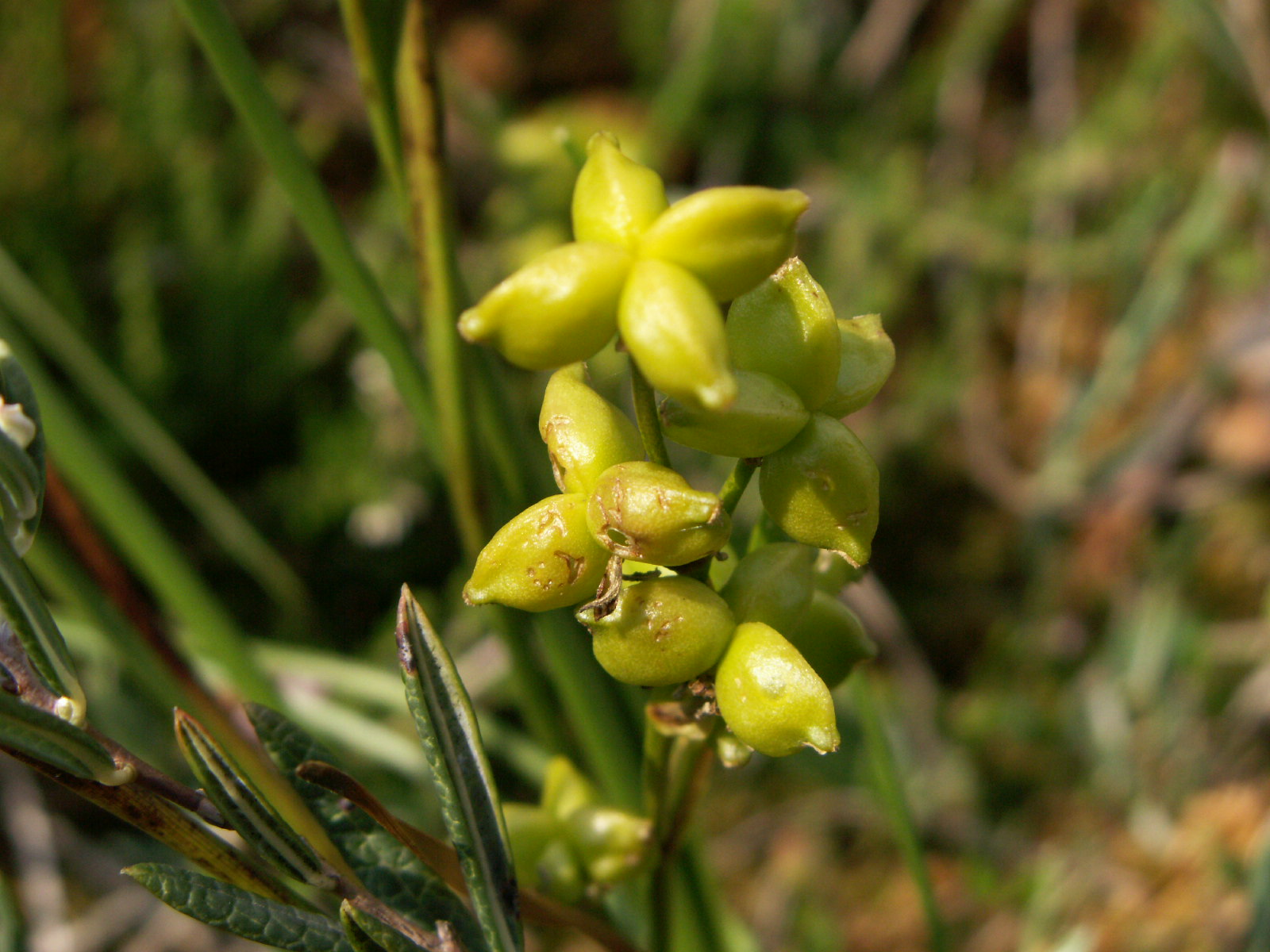 Scheuchzeria palustris Balgfruechte